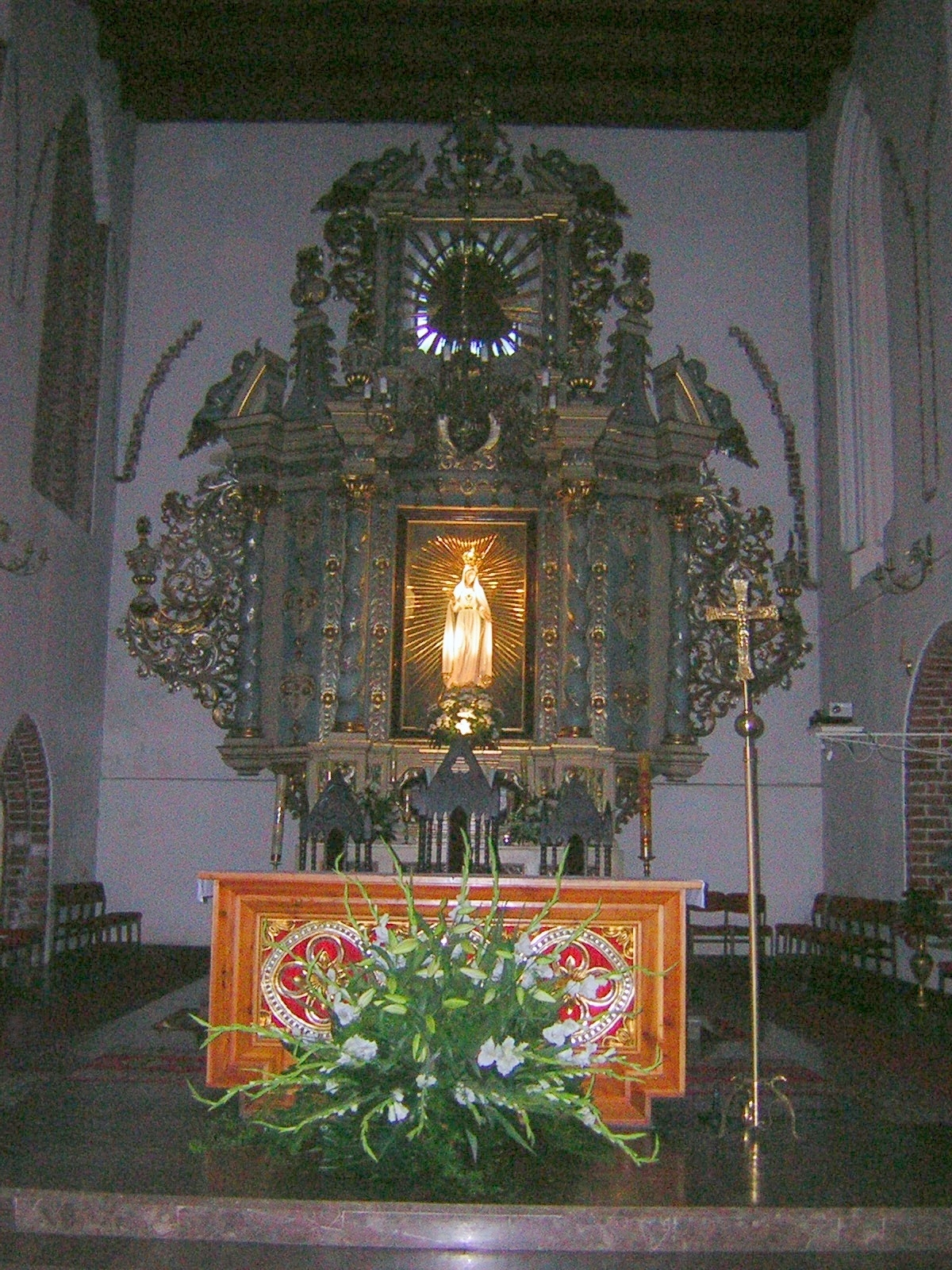 Kościół Przemienienia Pańskiego w Iławie, Wnętrze Author: Marcin n MARCIN N 19:55, 13 July 2006 (UTC)